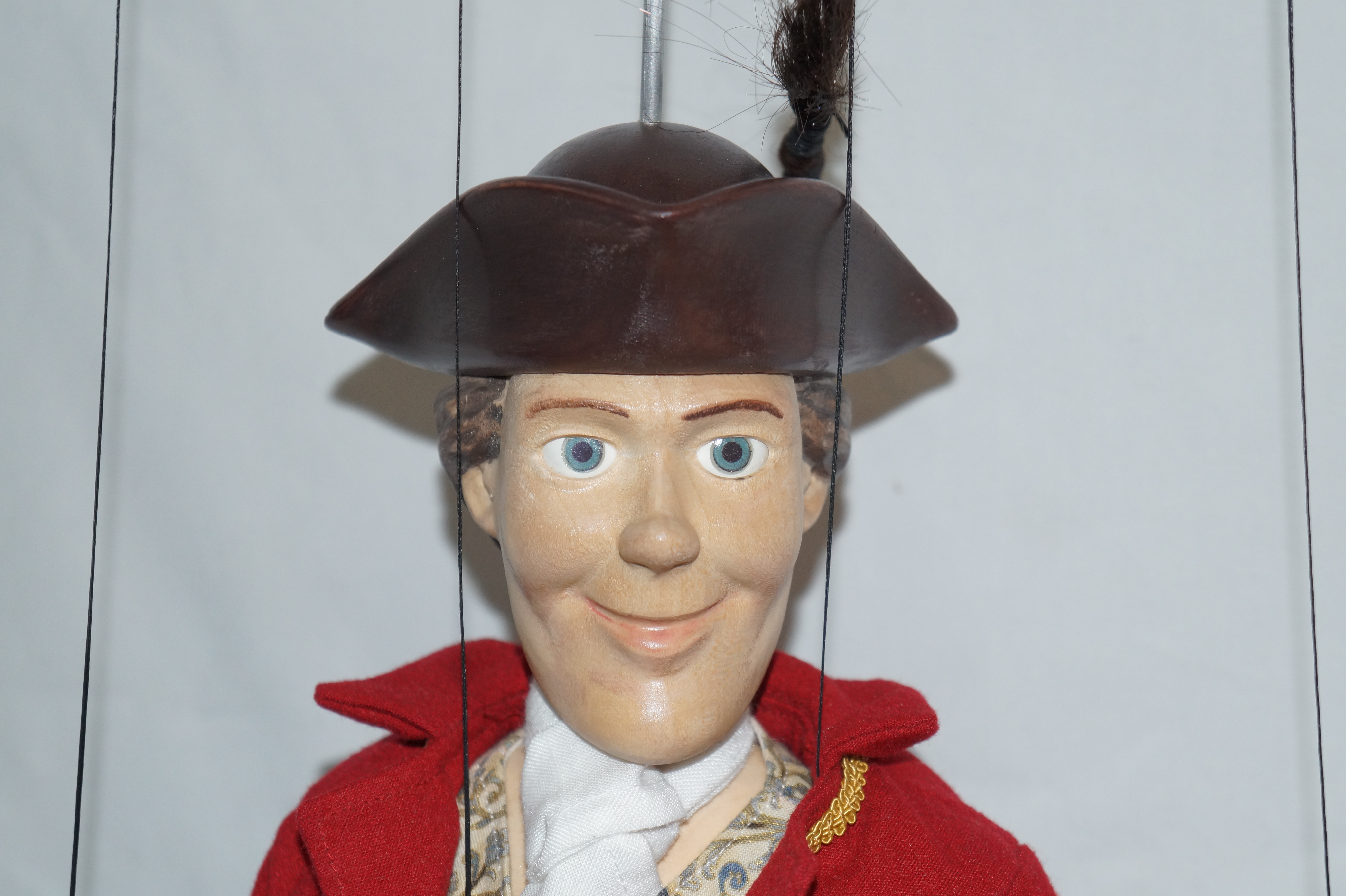 Fabriquée en tilleul